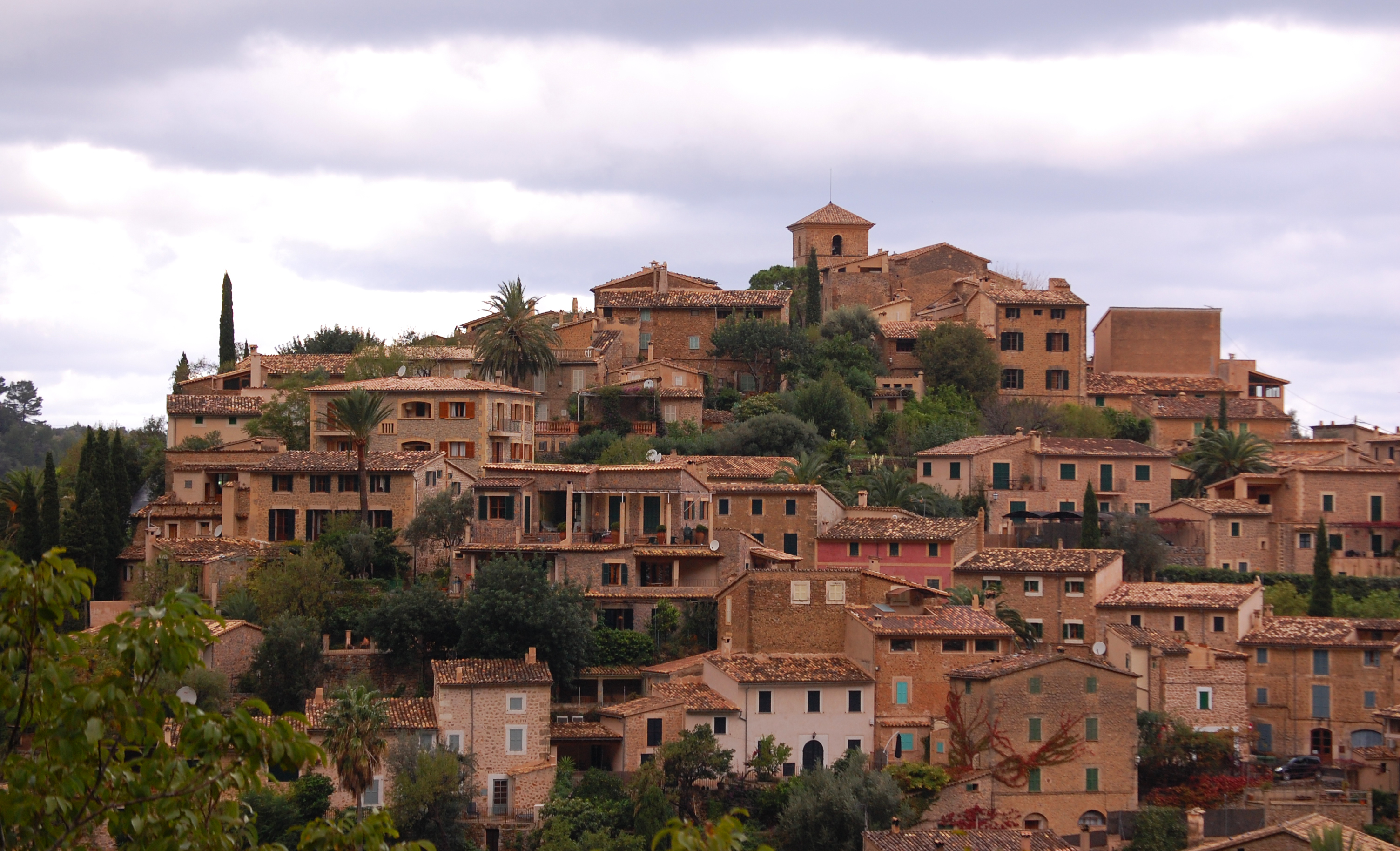 Deiá